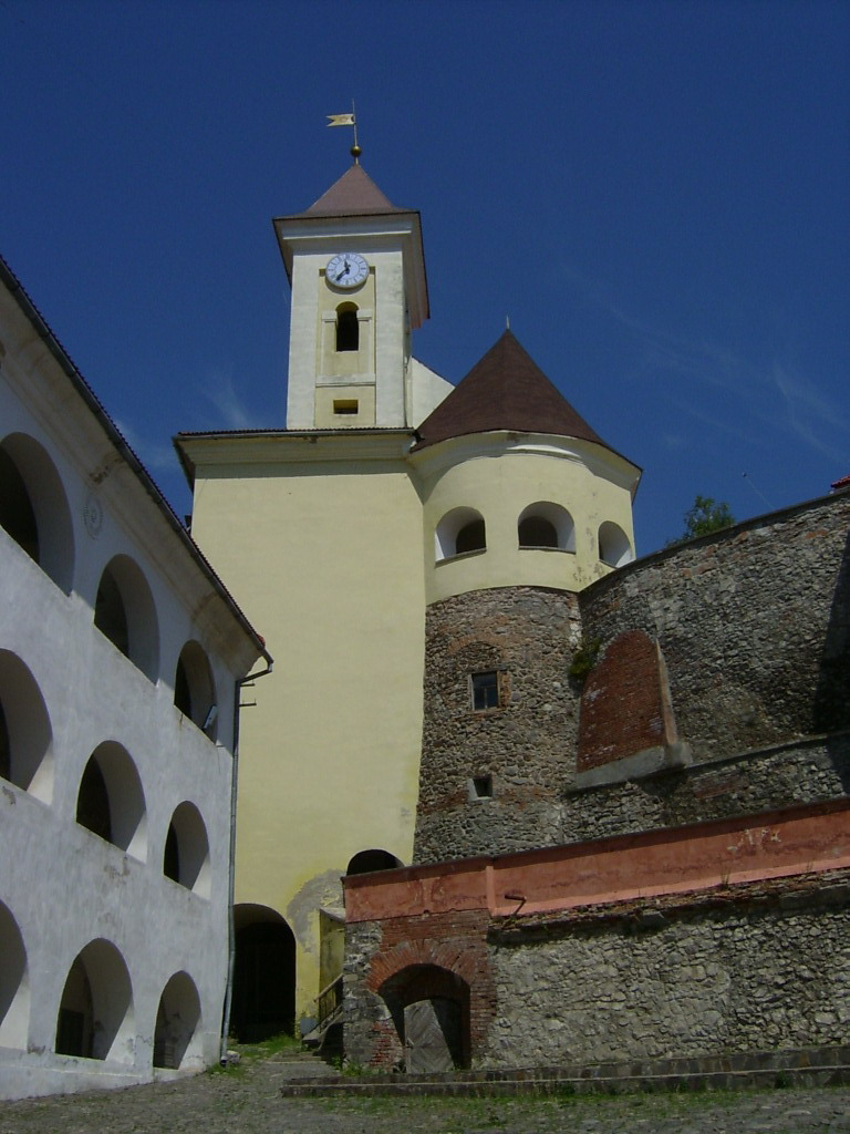 Munkács vára (Kárpátalja, Ukrajna)